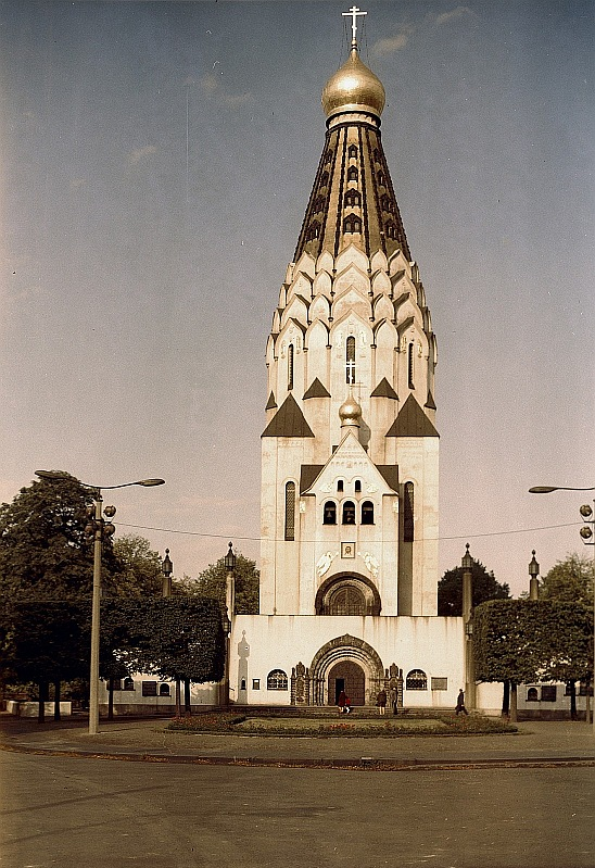 Original image description from the Deutsche Fotothek Leipzig. St.-Alexi-Gedächtniskirche zur Russischen Ehre